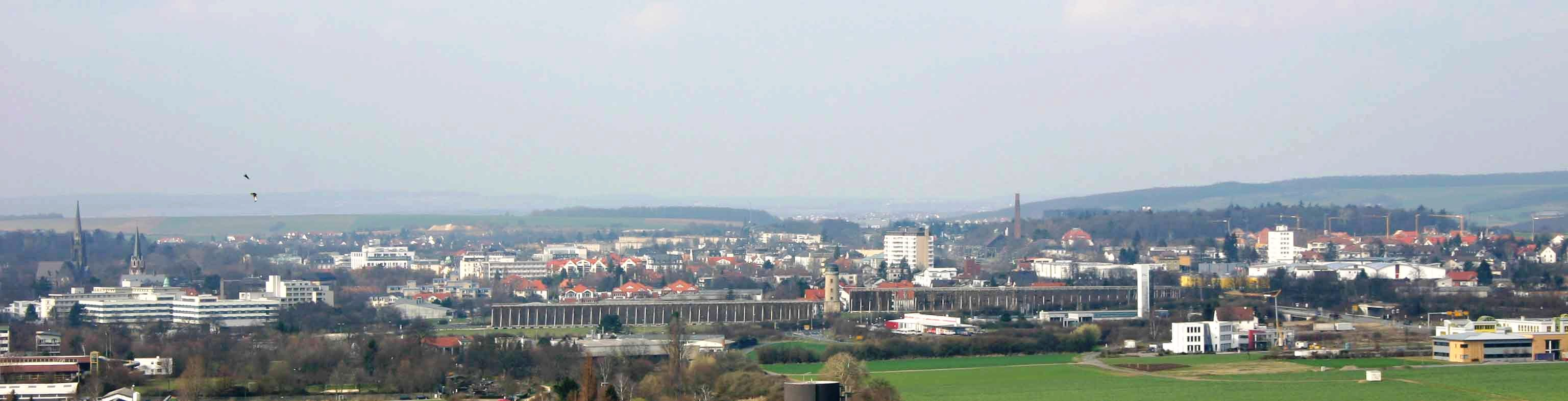 Blick über Bad Nauheim, aufgenommen vom Adolfsturm in Friedberg (Hessen). Im Vordergrund die Gradierwerke.